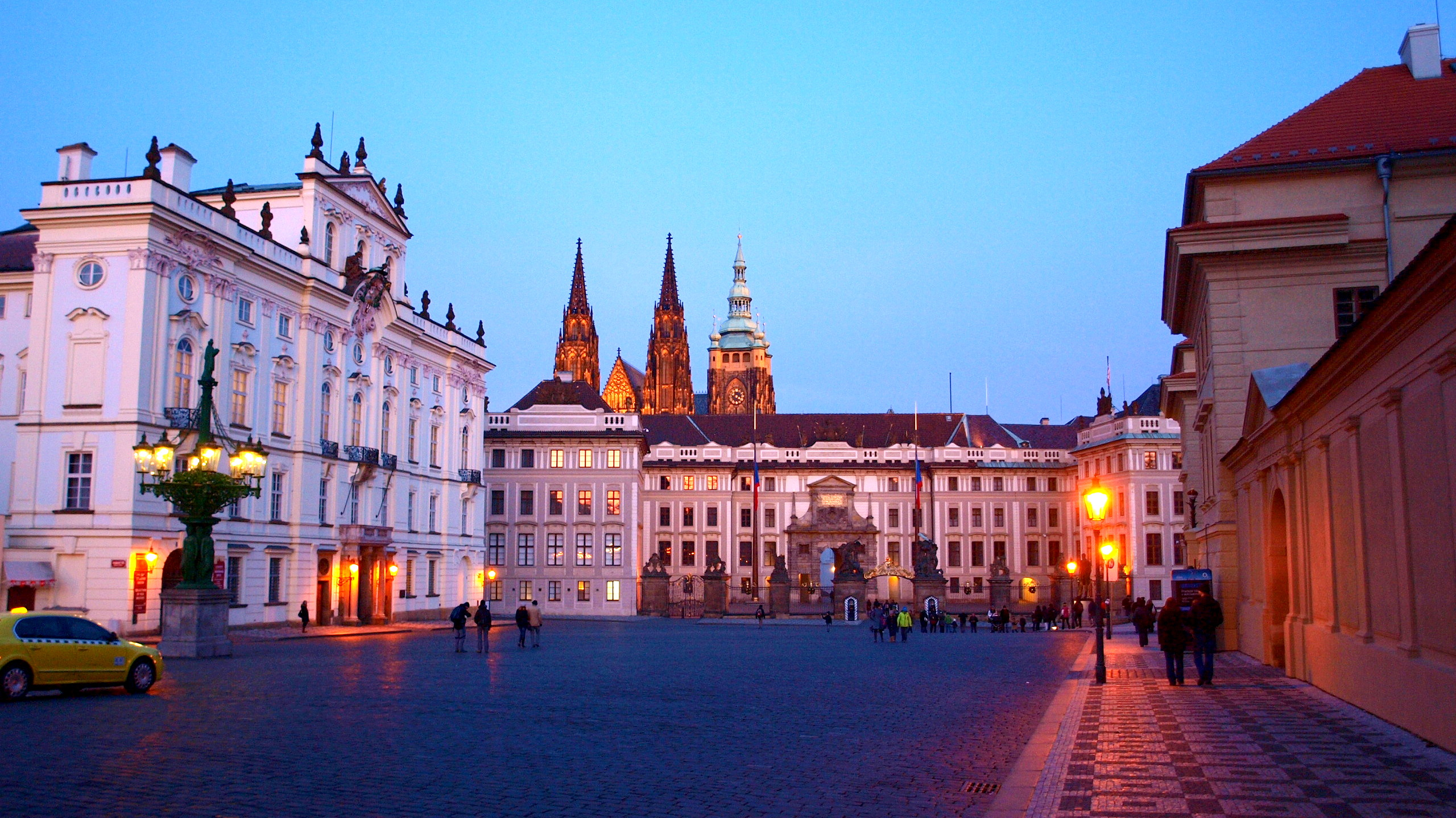 Arcibiskupský palác s Pražským hradem